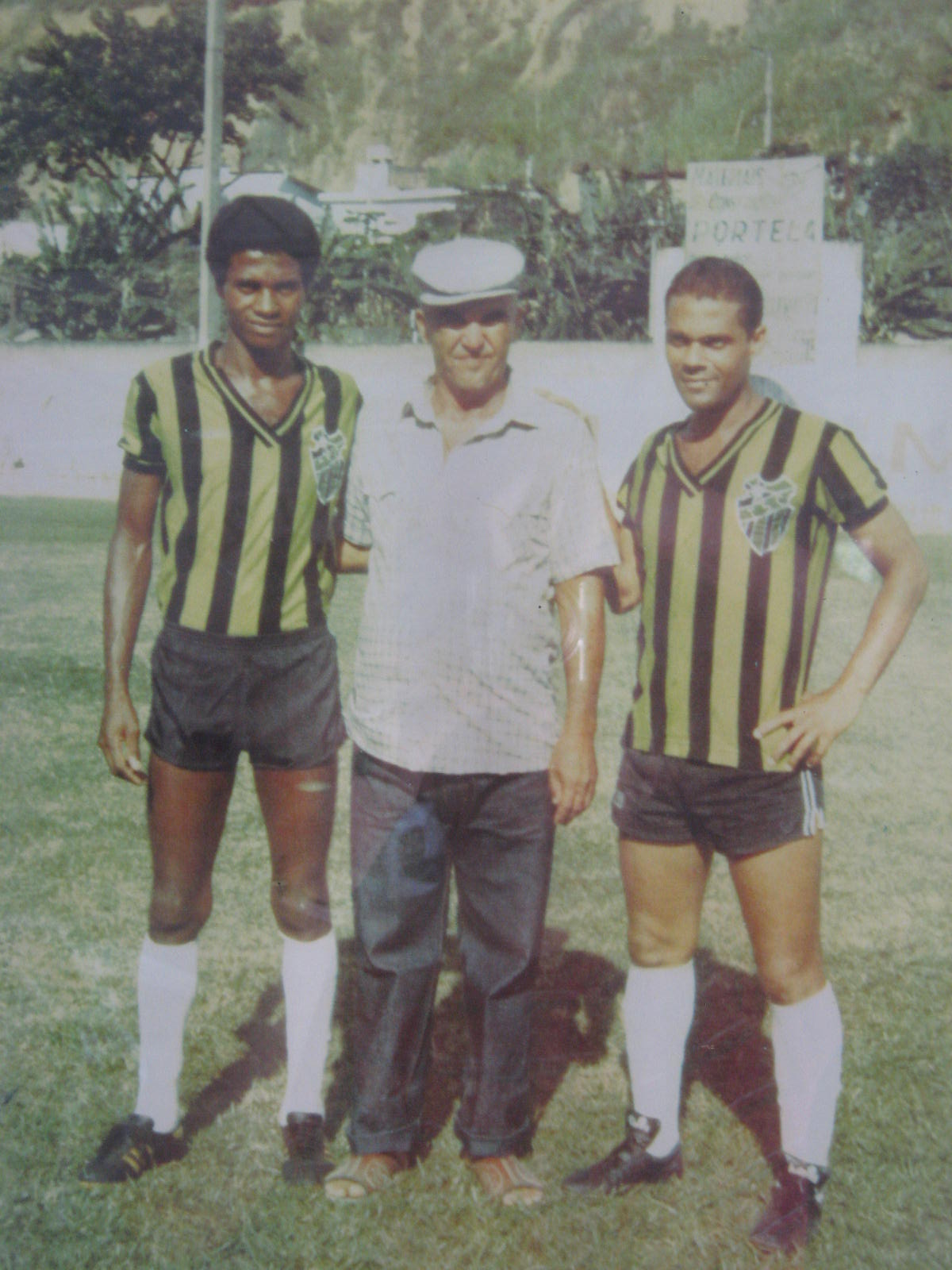 Atletas do Tupy nos anos 70.